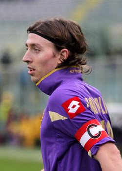 Riccardo Montolivo (Caravaggio, 18 gennaio 1985) è un calciatore italiano, centrocampista del Milan e della Nazionale italiana.